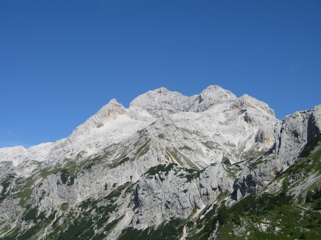 Najvišji vrh je Triglav. Slikano malo dlje od Vodnikovega doma na Velem polju